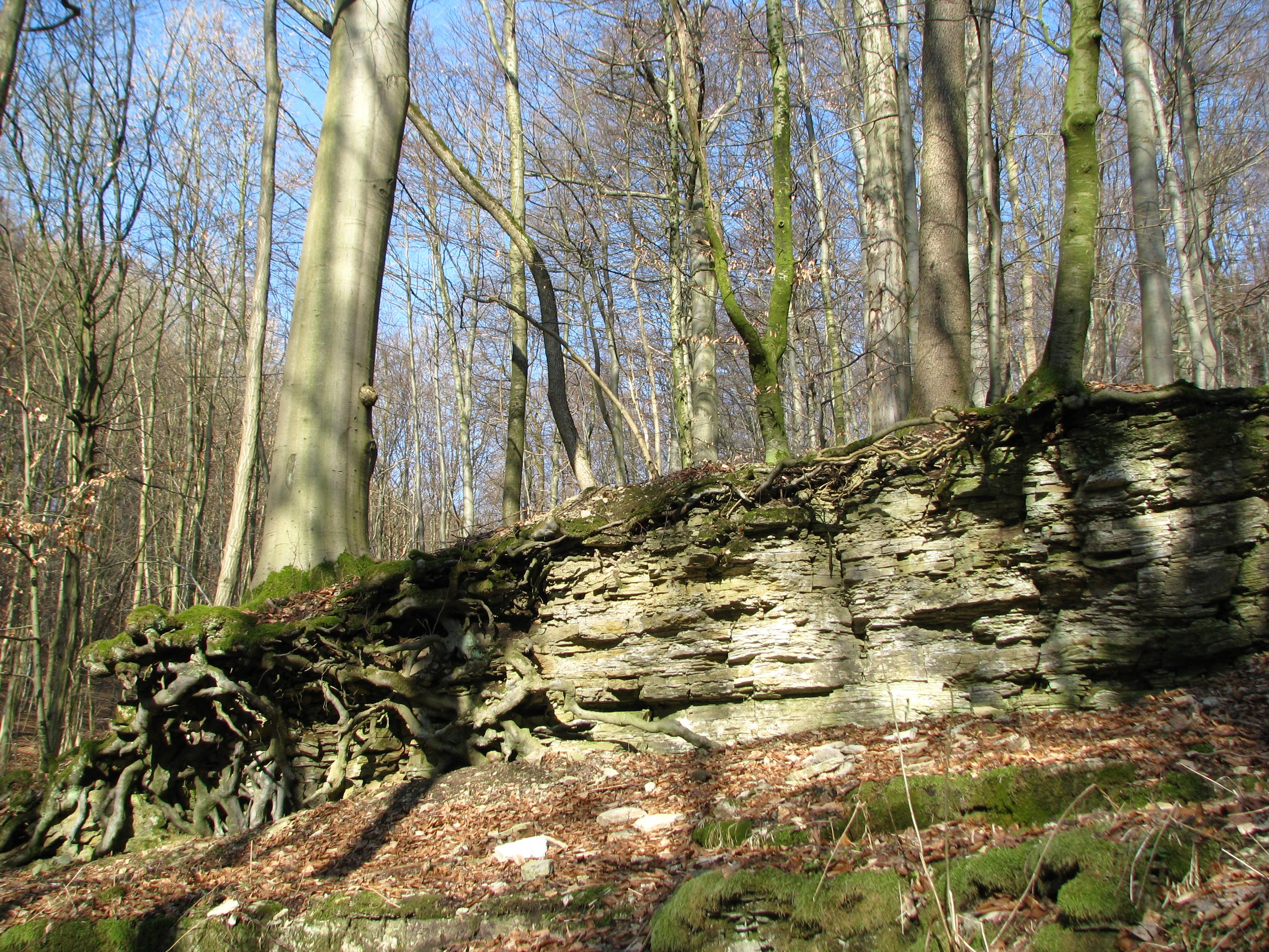 Muschelkalkaufschluss im Langen Tal im südlichen Hainich